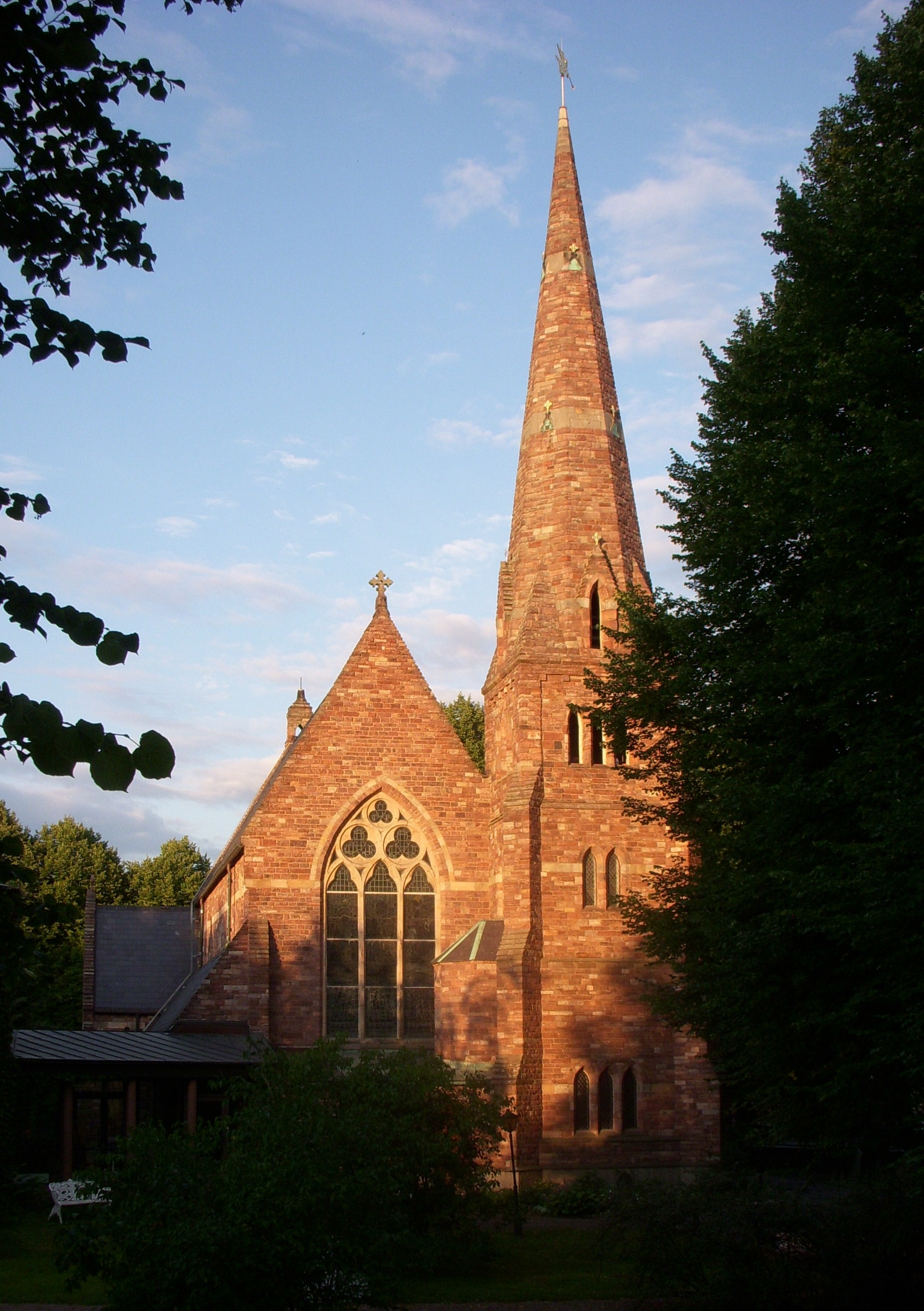 Engelska kyrkan i Diplomatstaden i Stockholm